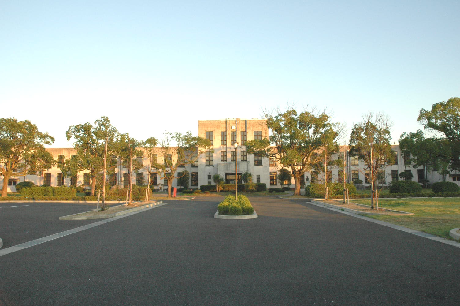 Altes Schulgebäude der Städtischen Grundschule Toyosato. Erbaut 1937 in Toyosato, Präfektur Shiga. Entworfen von William Merrell Vories